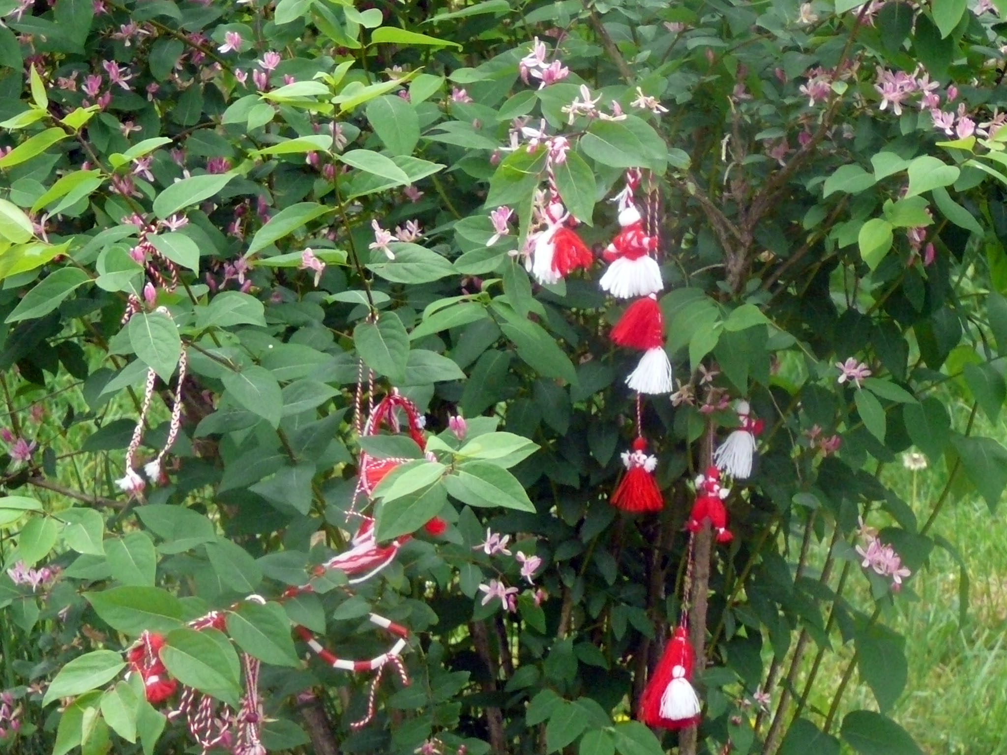 Martenitsa